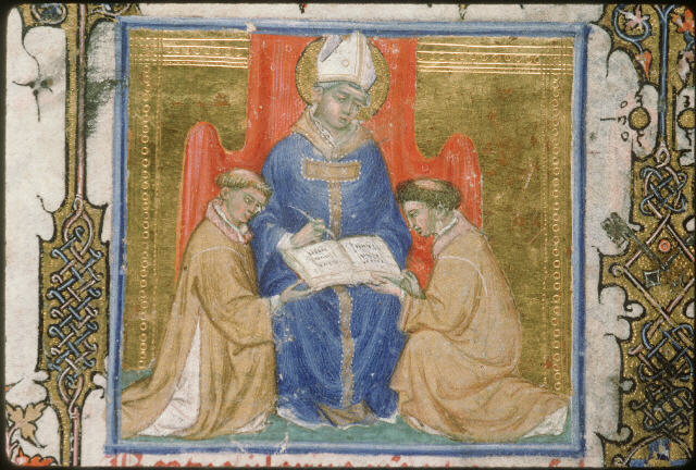 Caplletra d'un manuscrit del s. XIV amb Sant Hilari d'Arle escrivint.